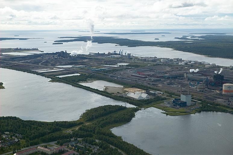 Lulekraft och Bioenergi. Motiv: Luleå Nyckelord: Flygbilder Kategori: Hamnmiljöer Lulekraft och Bioenergi.